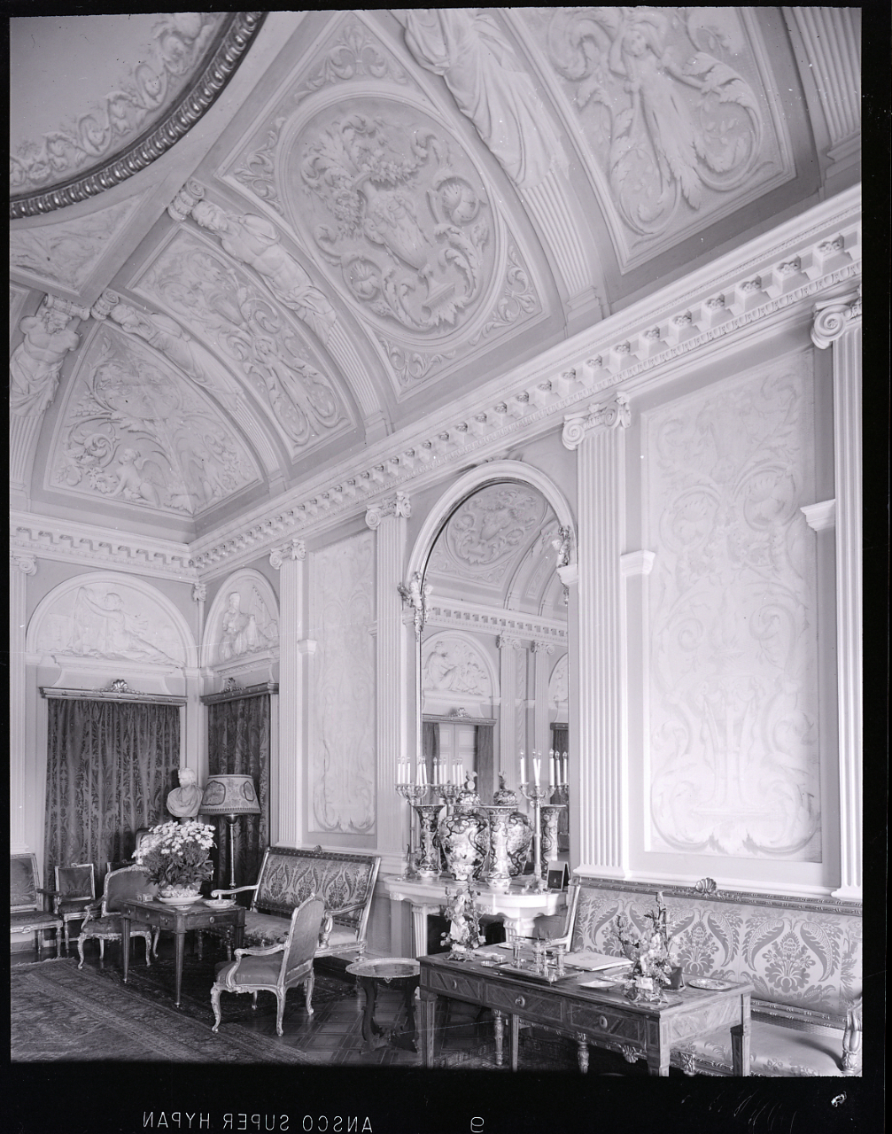 Servizio fotografico : Genova, 1963 / Paolo Monti. - Buste: 10, Fototipi: 10 : Negativo b/n, gelatina bromuro d'argento/ pellicola ; 10x12. - ((Serie costituita da 10 buste sciolte di negativi identificati con i nn.: 6269, 6270, 6271, 6272, 6273, 6274, 6274bis, 6275, 6276, 6277. - Il negativo identificato con il numero 46397 è stato realizzato per Zodiac. - Occasione: Documentazione per la pubblicazione: Italia Nostra (a cura di), "Le ville genovesi", catalogo della mostra, Genova 1962, Genova, Comune di Genova, 1967. - (1961-1963), presso Archivio Paolo Monti. - Fonte: Agenda di Paolo Monti: R 1 - Monti/ 1 aprile 1963 - 6 giugno 1964/ 6000-8193 (1963-1964), presso Archivio Paolo Monti. - Fonte: Monografia di Italia Nostra (a cura di): Le ville genovesi, catalogo della mostra, Genova 1962, Genova, Comune di Genova (1967). - Fonte: Lettera di Paolo Monti: I. Carteggi/ Genova - Enrico (1963-1966), presso Archivio Paolo Monti. Camicia con documenti dattiloscritti e manoscritti vari relativi al lavoro eseguito per Italia Nostra: preventivi, lettere, inventari. - Fonte: Rubrica di Paolo Monti: Archivio fino 1-4-1961/ 31-3-1963